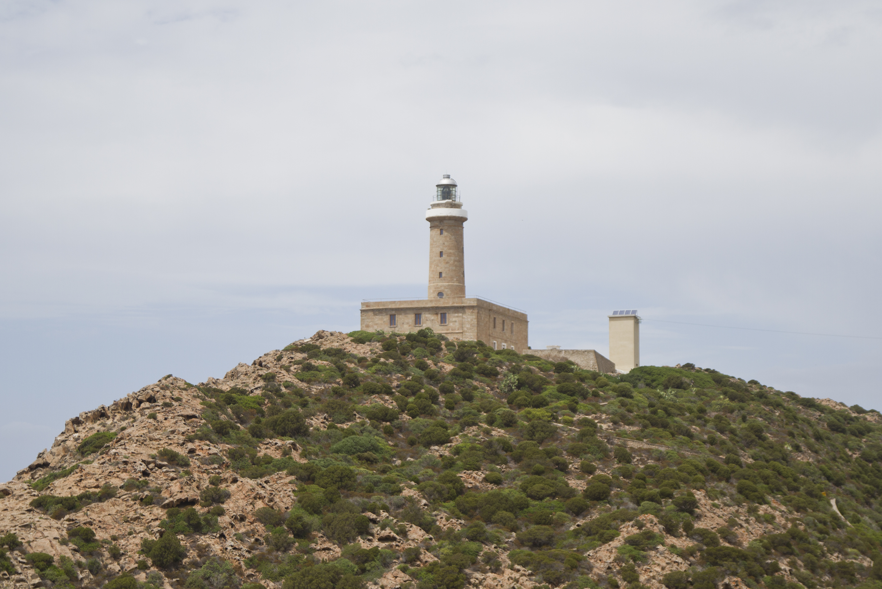 Capo Sandalo faro, Isola di San Pietro, Carloforte CI, Sardinia, Italy